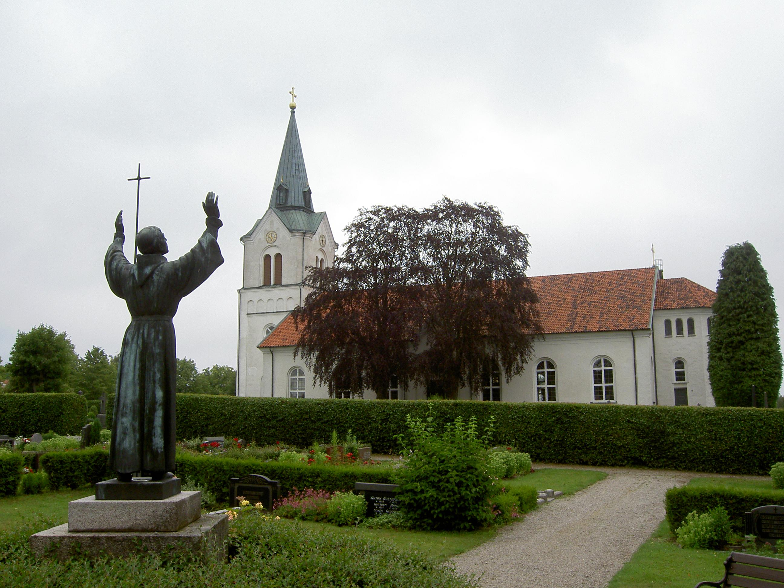 Kyrkhults kyrka